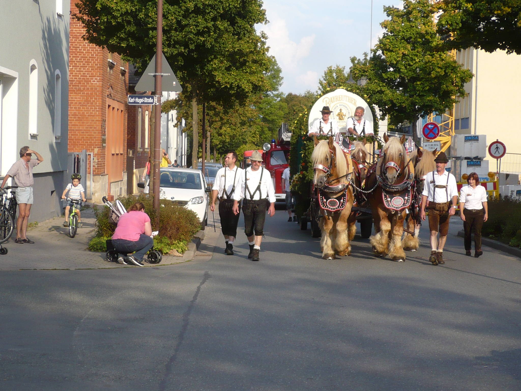 Kerwaumzug Bayreuth-Kreuz